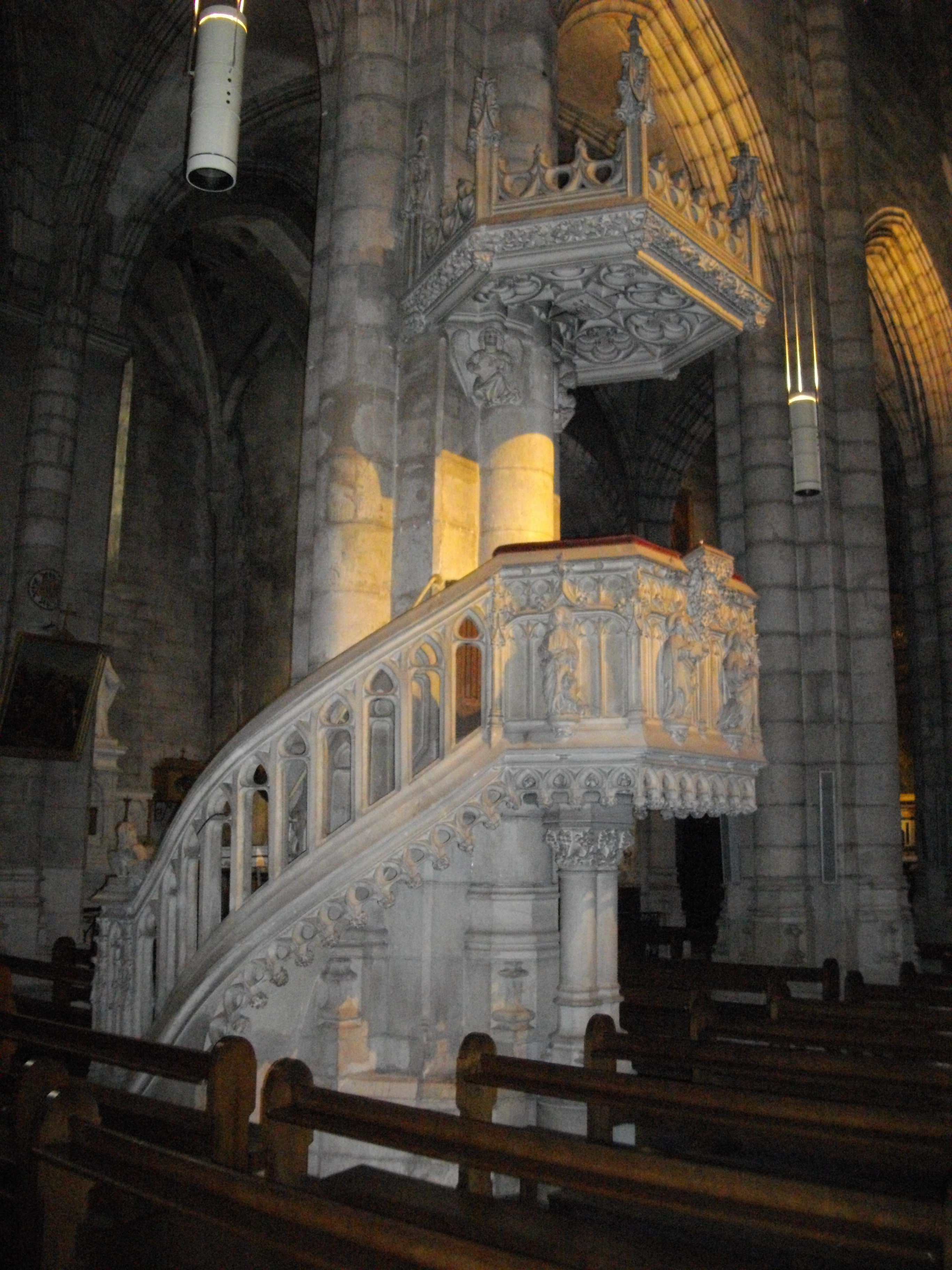 Chaire d'imitation gothique ajoutée au XIXème par l'architecte controversé Camille Bodin-Legendre.